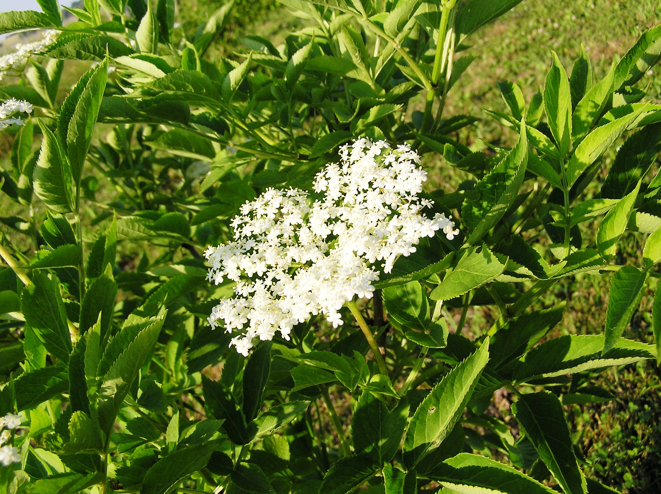 Schwarzer Holunder, fotografiert in Barth